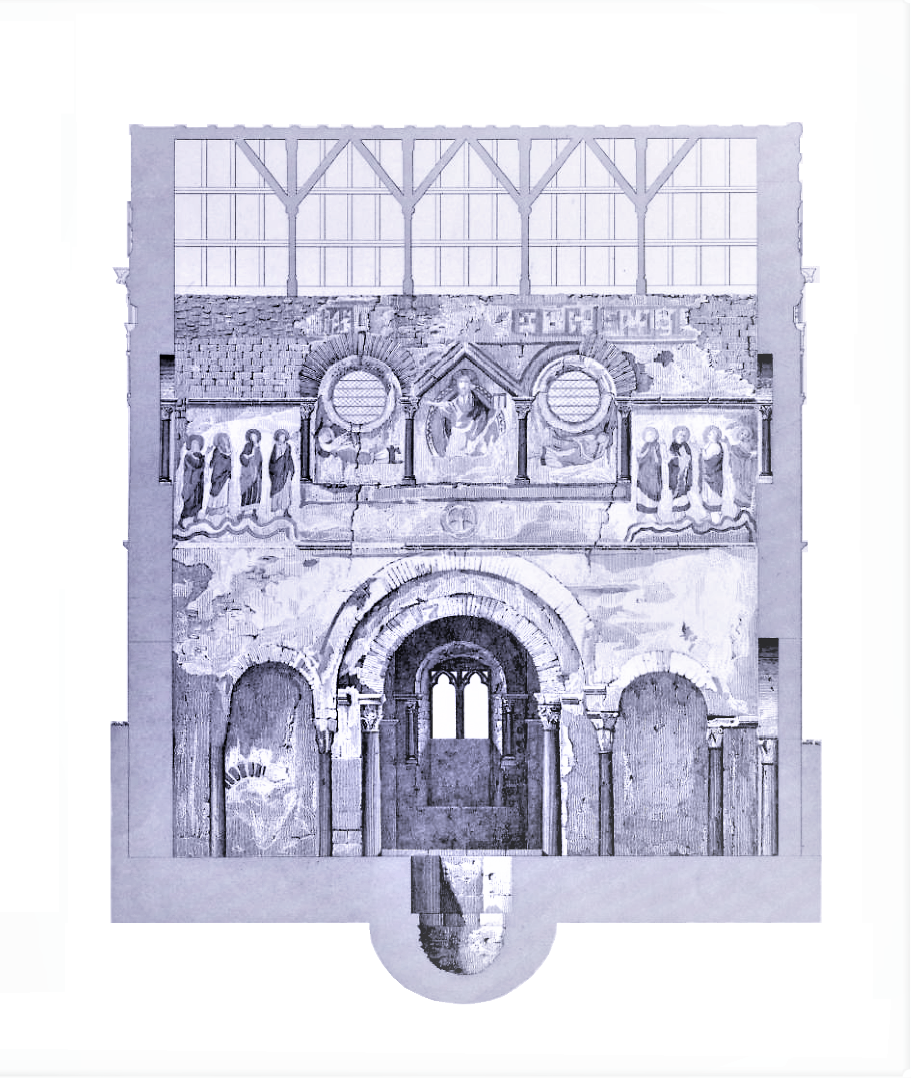 Baptistère de Poitiers, coupe Nord-Sud en 1857 (image du domaine public (Gailhabaud) modifiée)